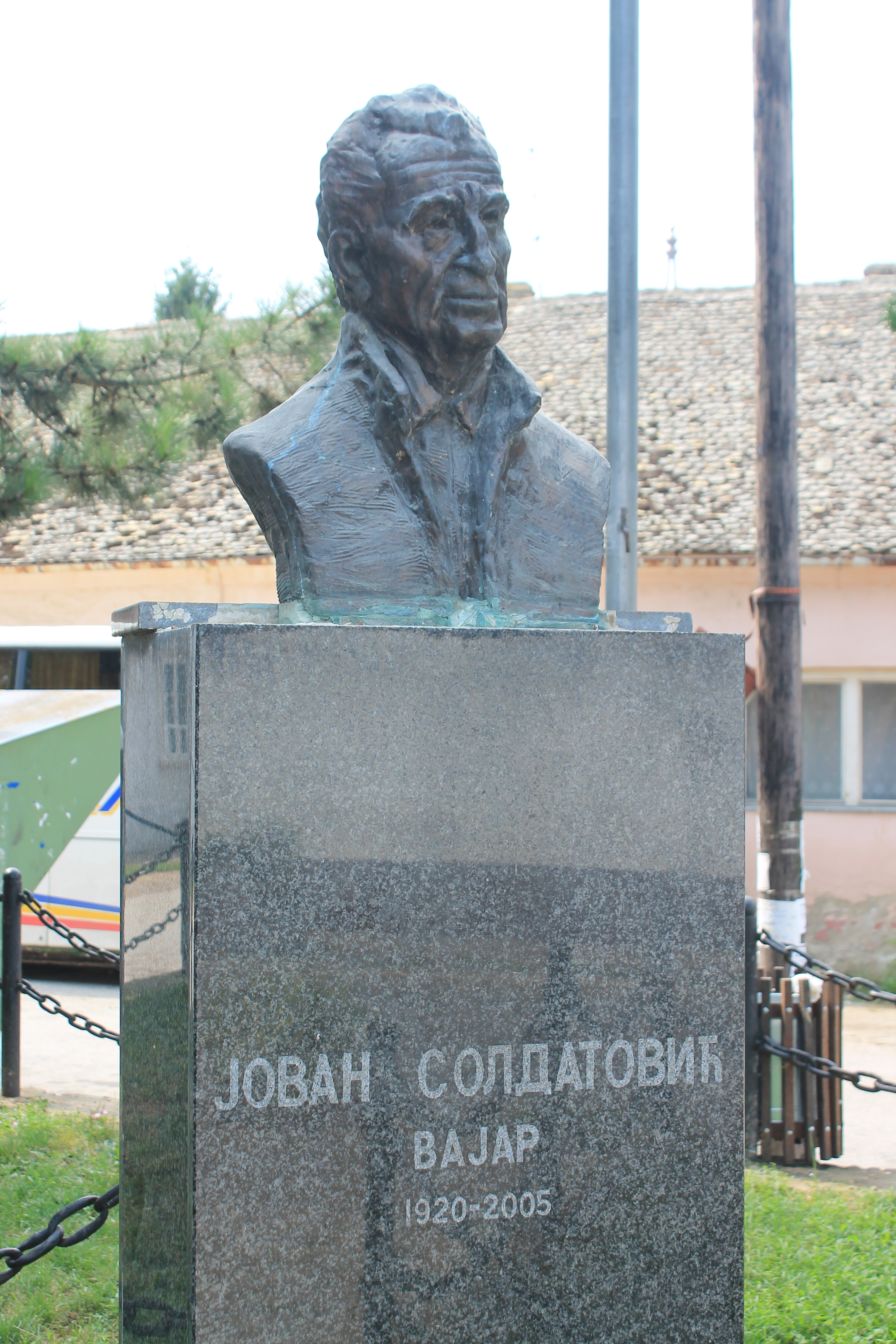 Čerević